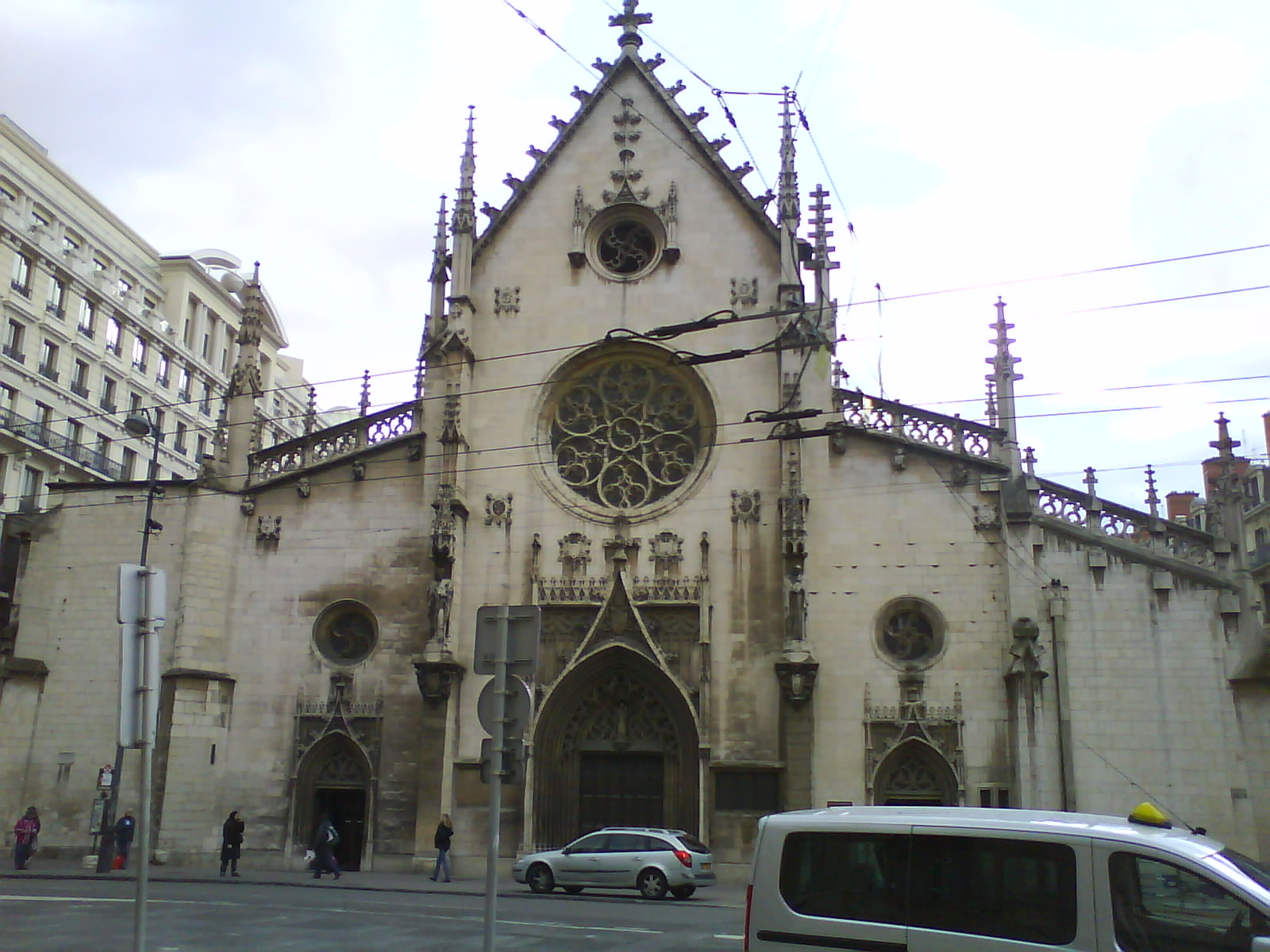 Église Saint-Bonaventure, Lyon 69002